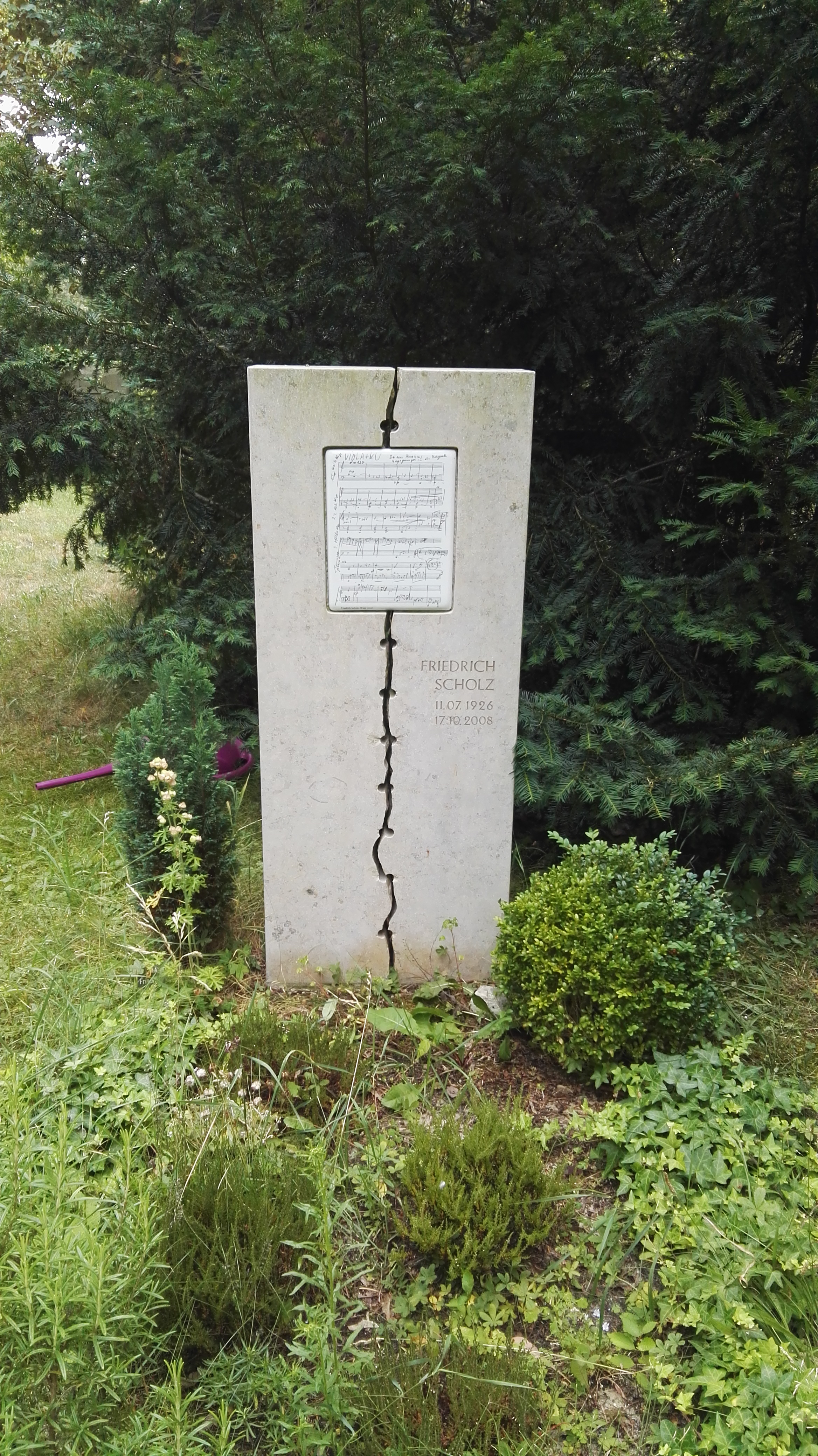 Grabmal für den Komponisten Friedrich Scholz auf dem Luisenstädter Friedhof in Berlin